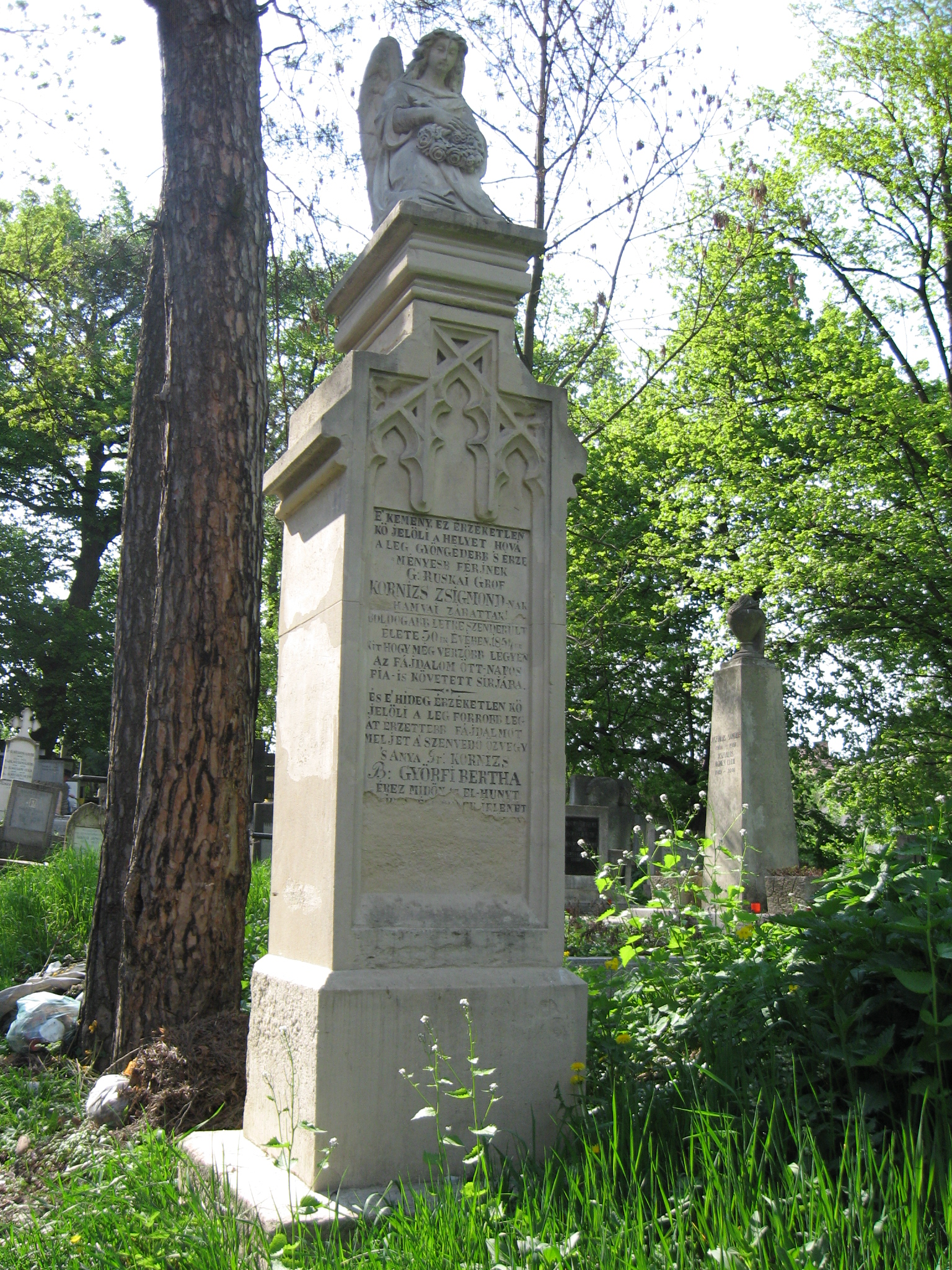 Kornizs Zsigmond sírja a kolozsvári Házsongárdi temetőben. 135